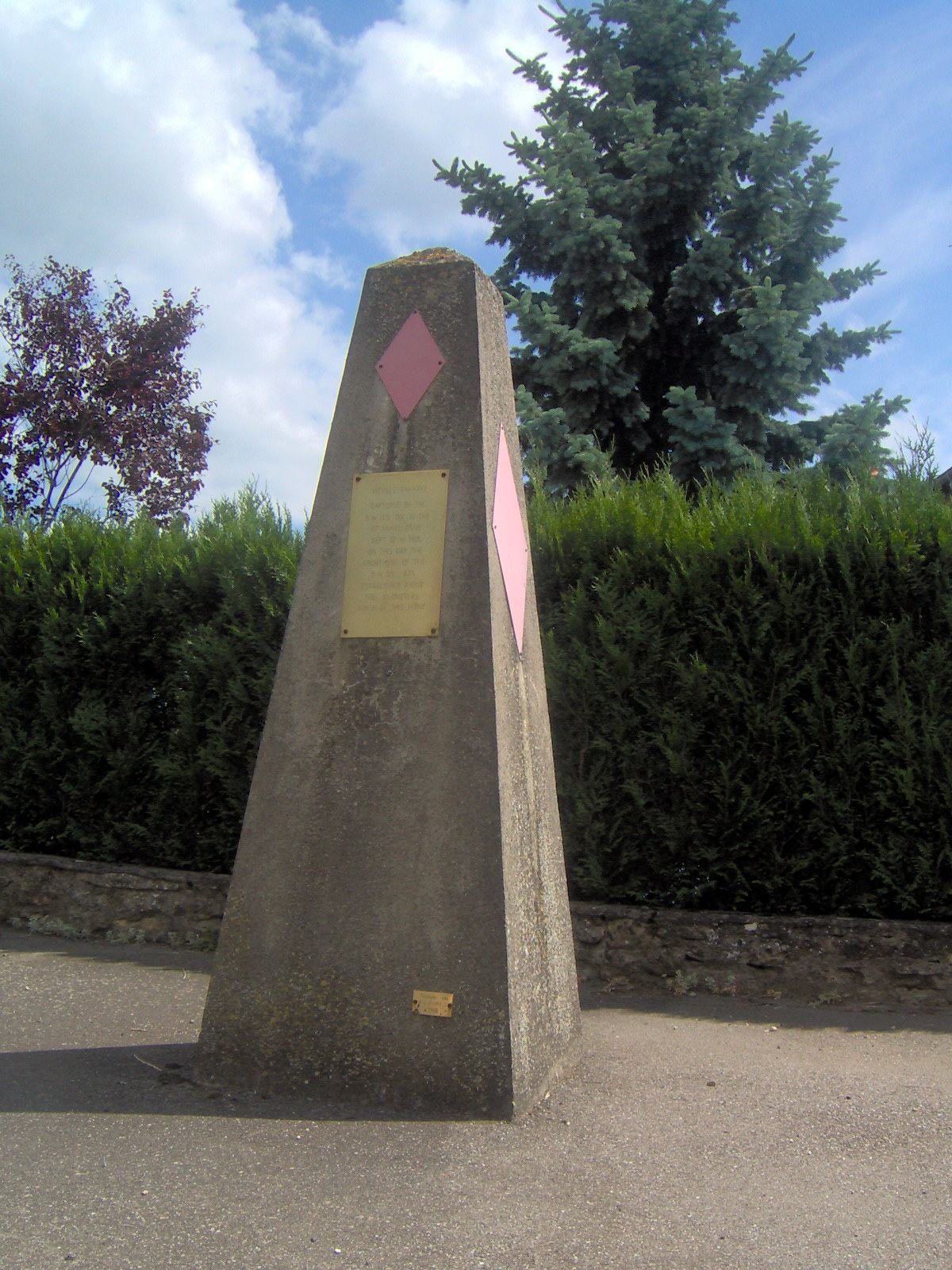 Viéville-en-Haye, Monument américain, 1918